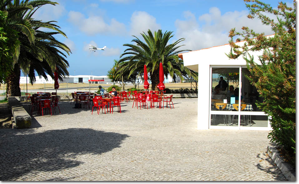 Restaurante Aeródromo Municipal de Cascais